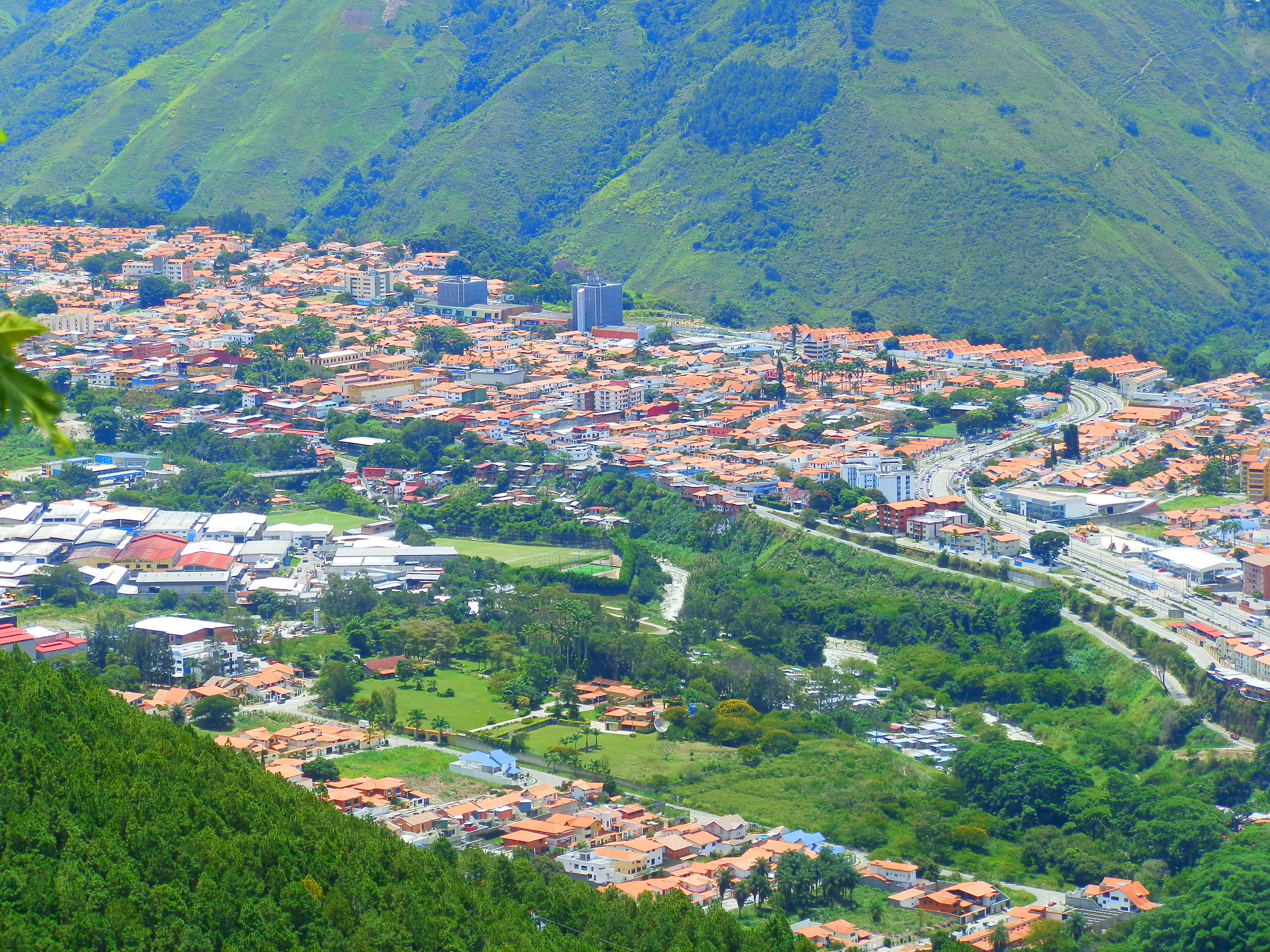 Creo que es el sur de la ciudad de Mérida (Venezuela)